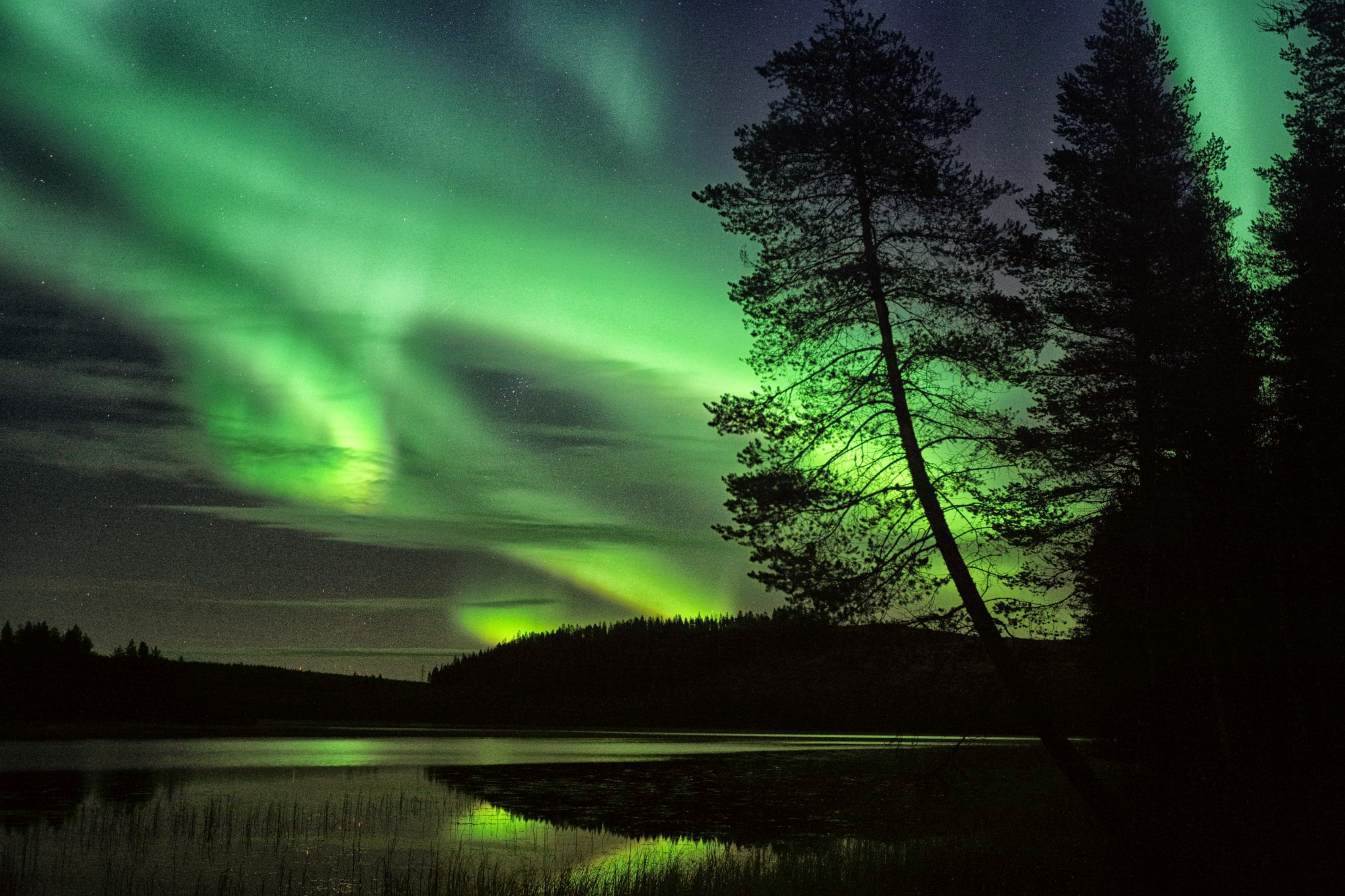 Le aurore boreali si susseguono durante tutto il periodo più freddo ma se accade di vederle in autunno quando i laghi non sono ancora ghiacciati, l'effetto è amplificato